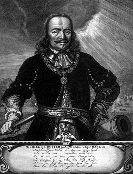 Michiel de Ruyter, portret (1673) door Hendrik Bary (1640-1707), naar Ferdinand Bol. De gedenkprent werd gemaakt vanwege De Ruyters overwinningen in 1673. Eronder staat de tekst van het beroemde gedicht van Gerard Brandt: Aanschouw den Heldt, der Staetenrechterhandt...